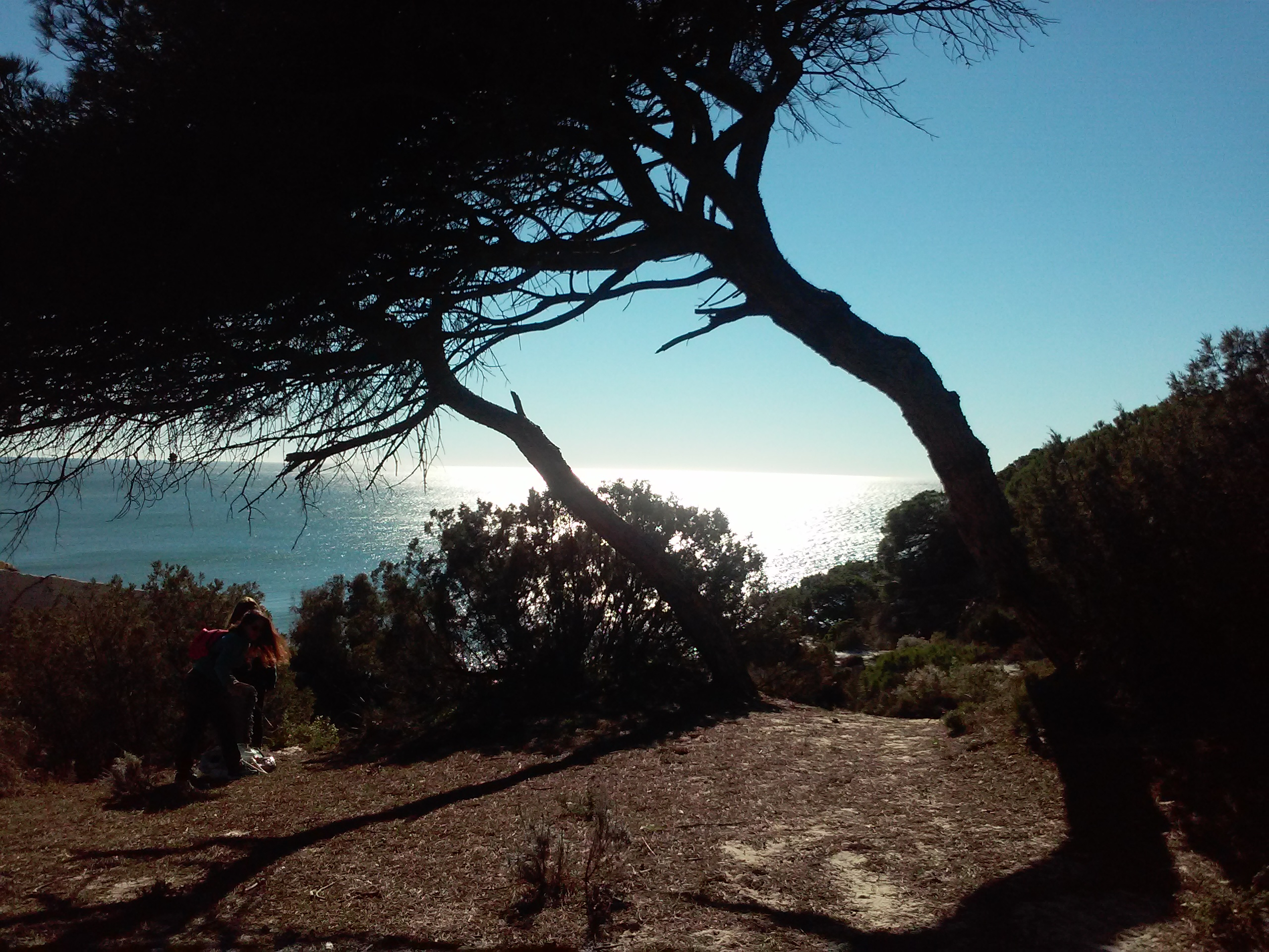 Pinares de Mazagón, playa de Rompeculos. Enero de 2017